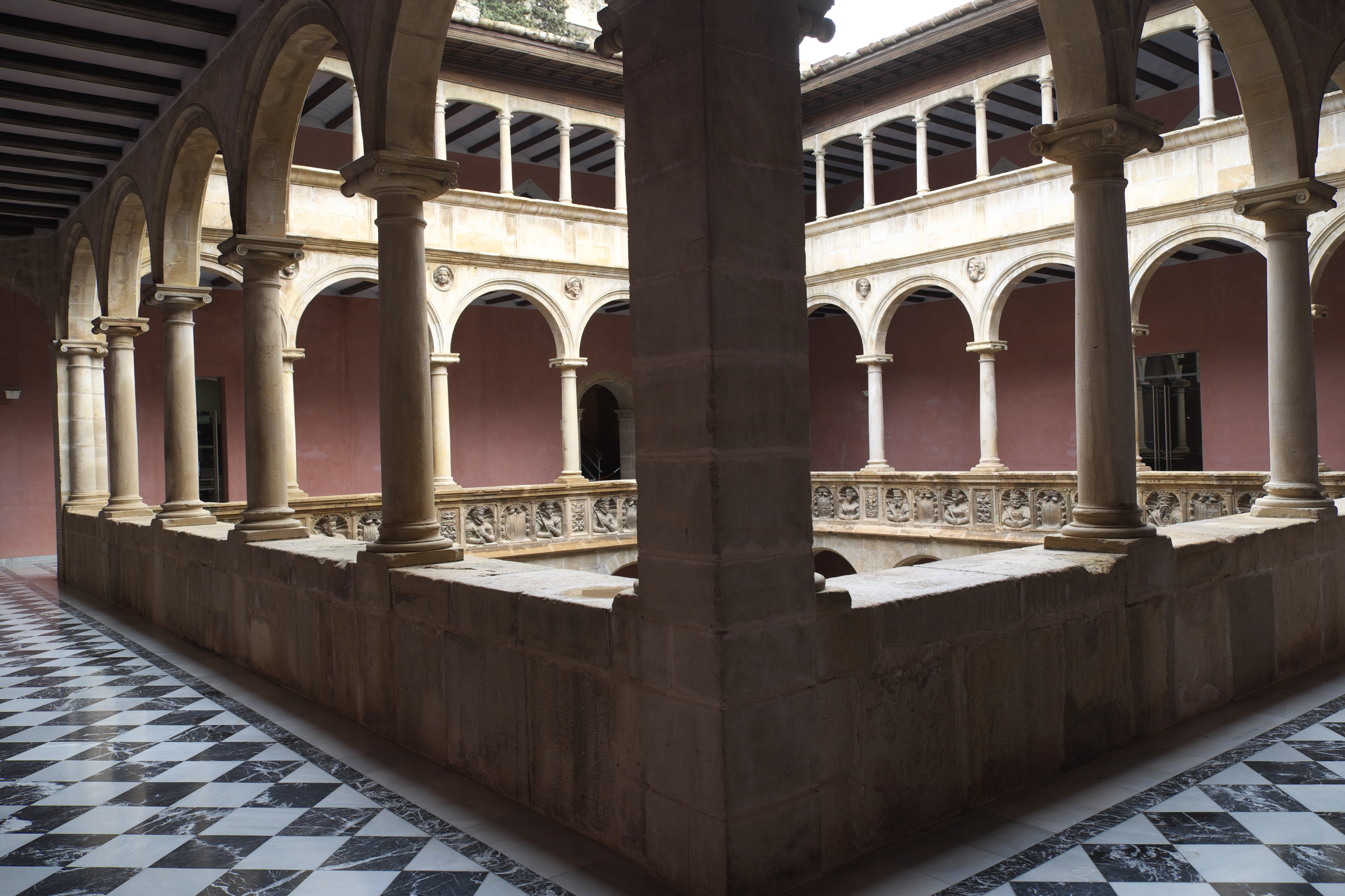 Colegio de San Jaime y San Matías in Tortosa in der Provinz Tarragona (Katalonien/Spanien), Innenhof